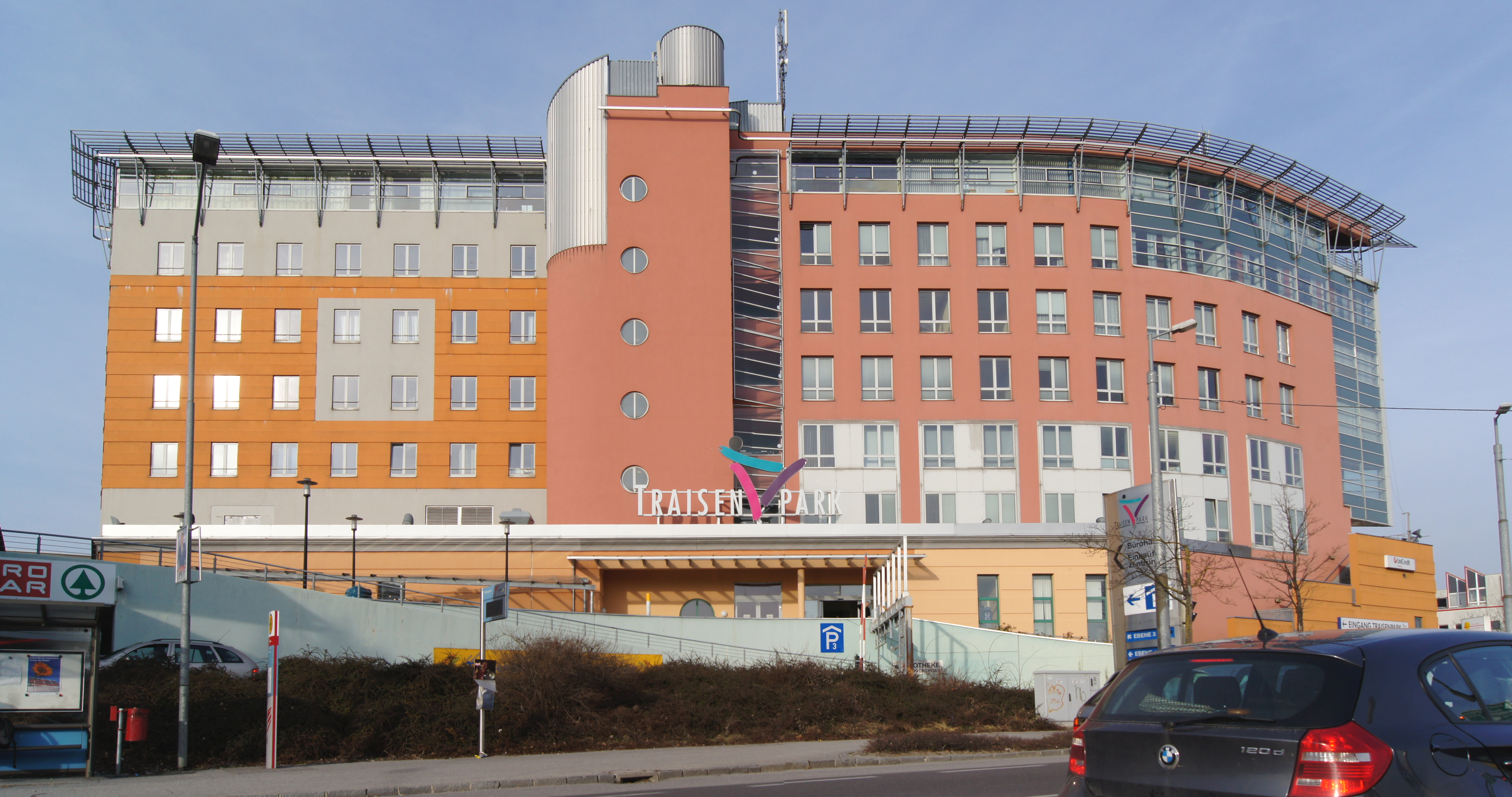 Der Büroturm des Traisenparks